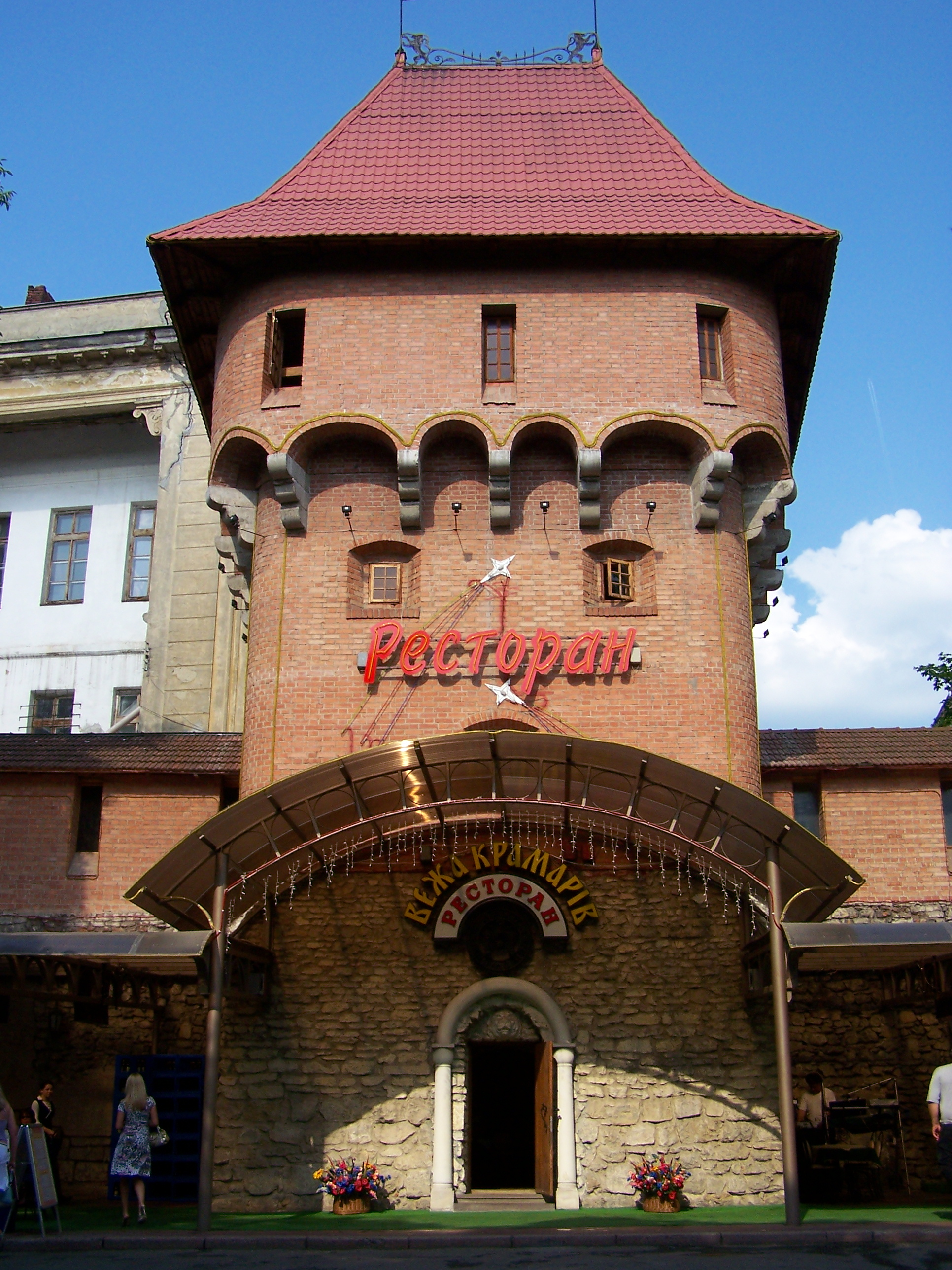 Baszta we Lwowie (Ukraina).